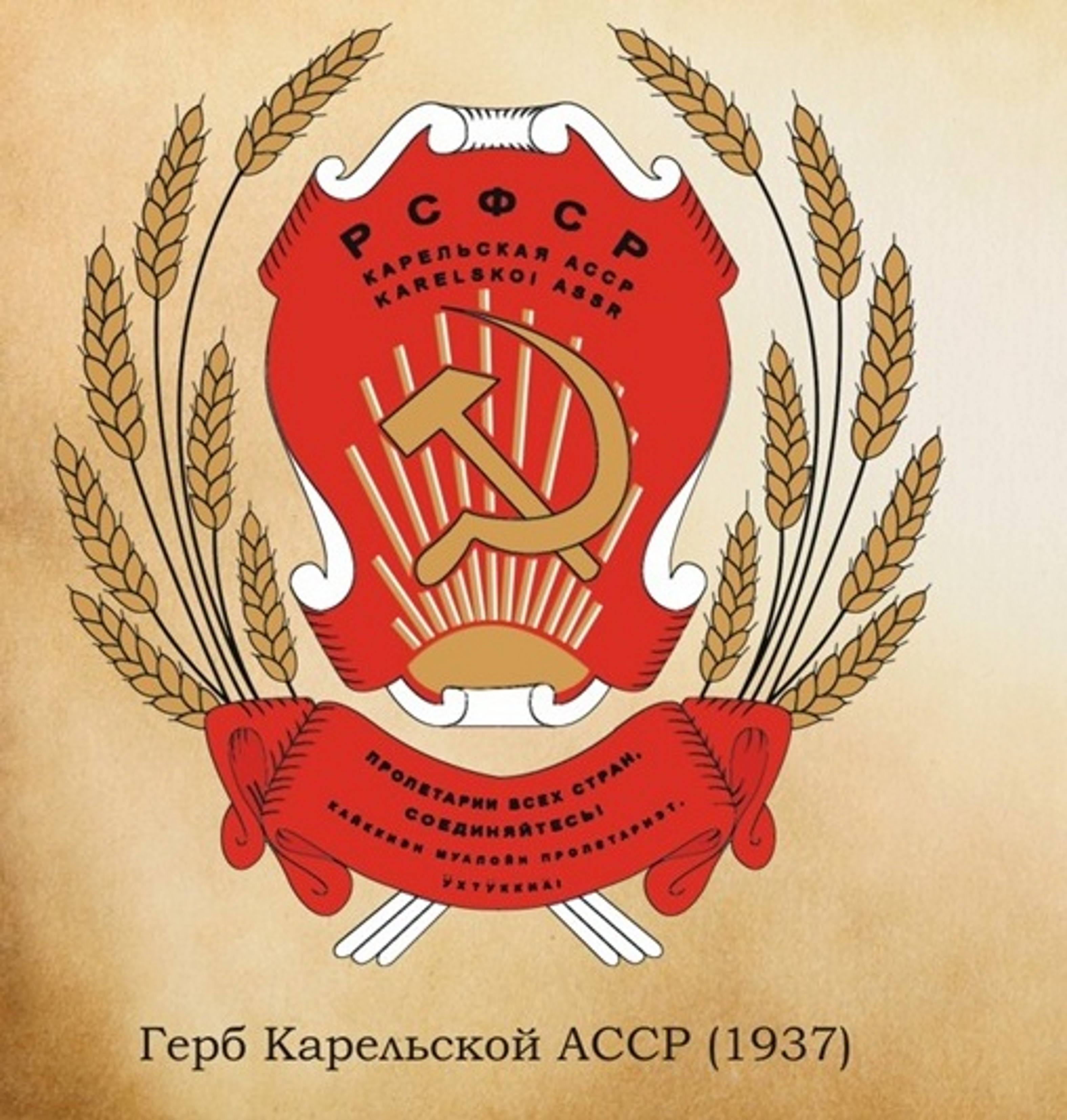 Герб Карельской АССР (1937-1940)